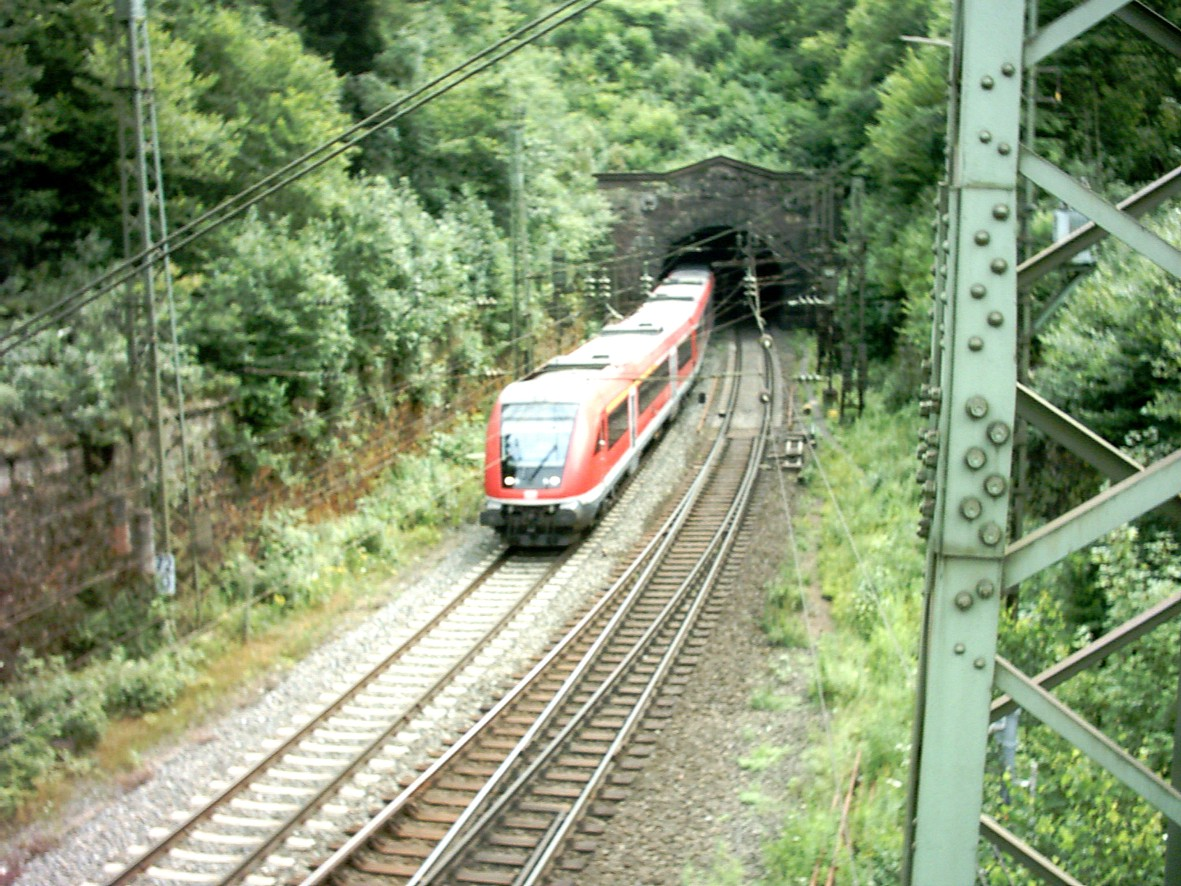 Schwarzkopftunnel der Main-Spessart-Bahn bei Heigenbrücken im Spessart mit Modus-Wagen. Fotograf: presse03, selbst fotografiert 2005 Lizenz: GNU-FDL